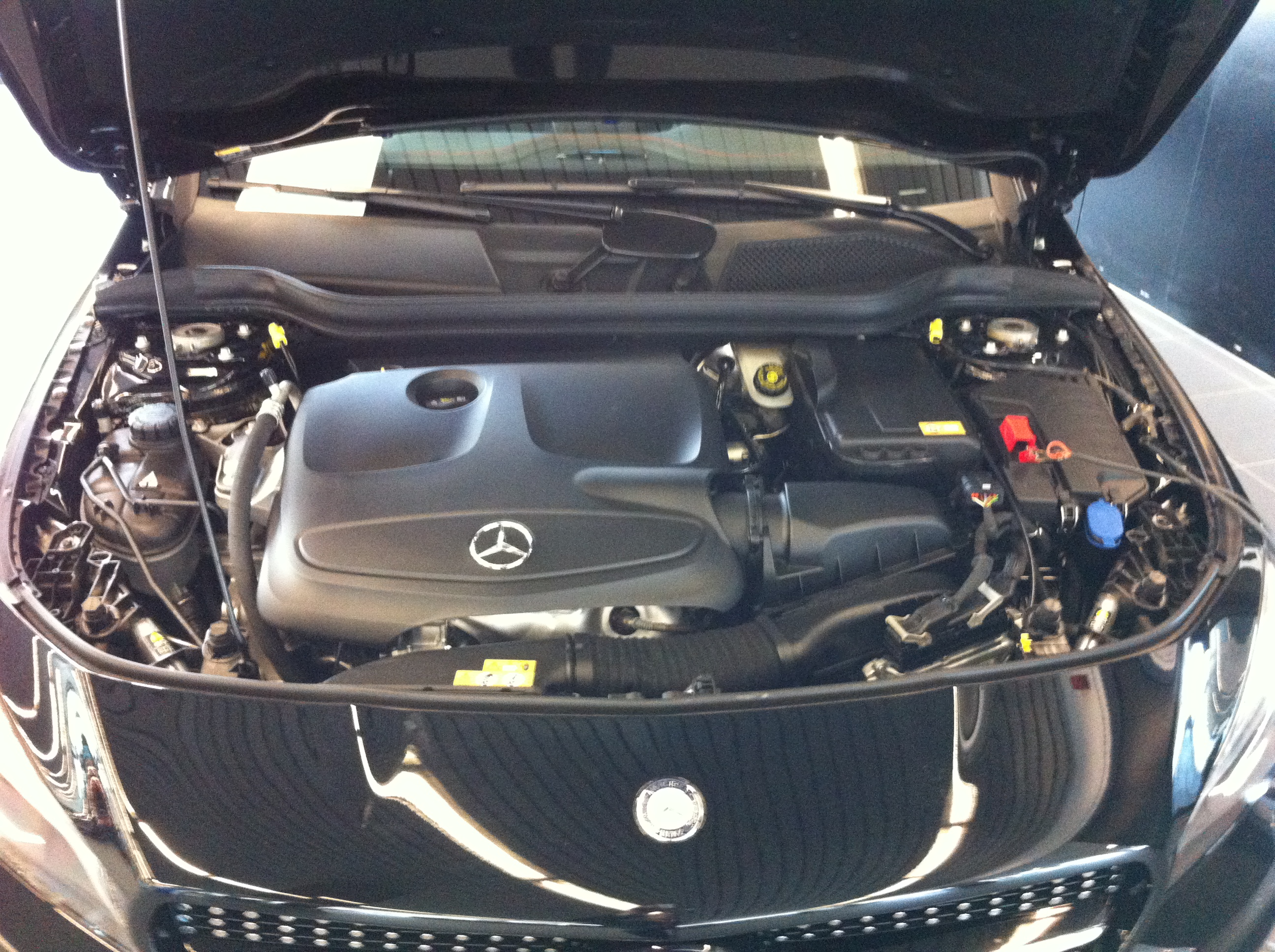 Motorraum Mercedes-Benz CLA 250